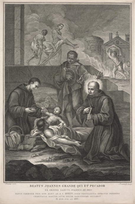 Beato Juan Grande atendiendo a las víctimas de la epidemia de peste. Grabado de Pietro Leone Bombelli, 1780. Princeton University Art Museum